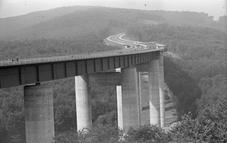 Stuttgart, Liederhalle und Bundesgartenschau und Autobahn, Spessart 11.-16.9.1961